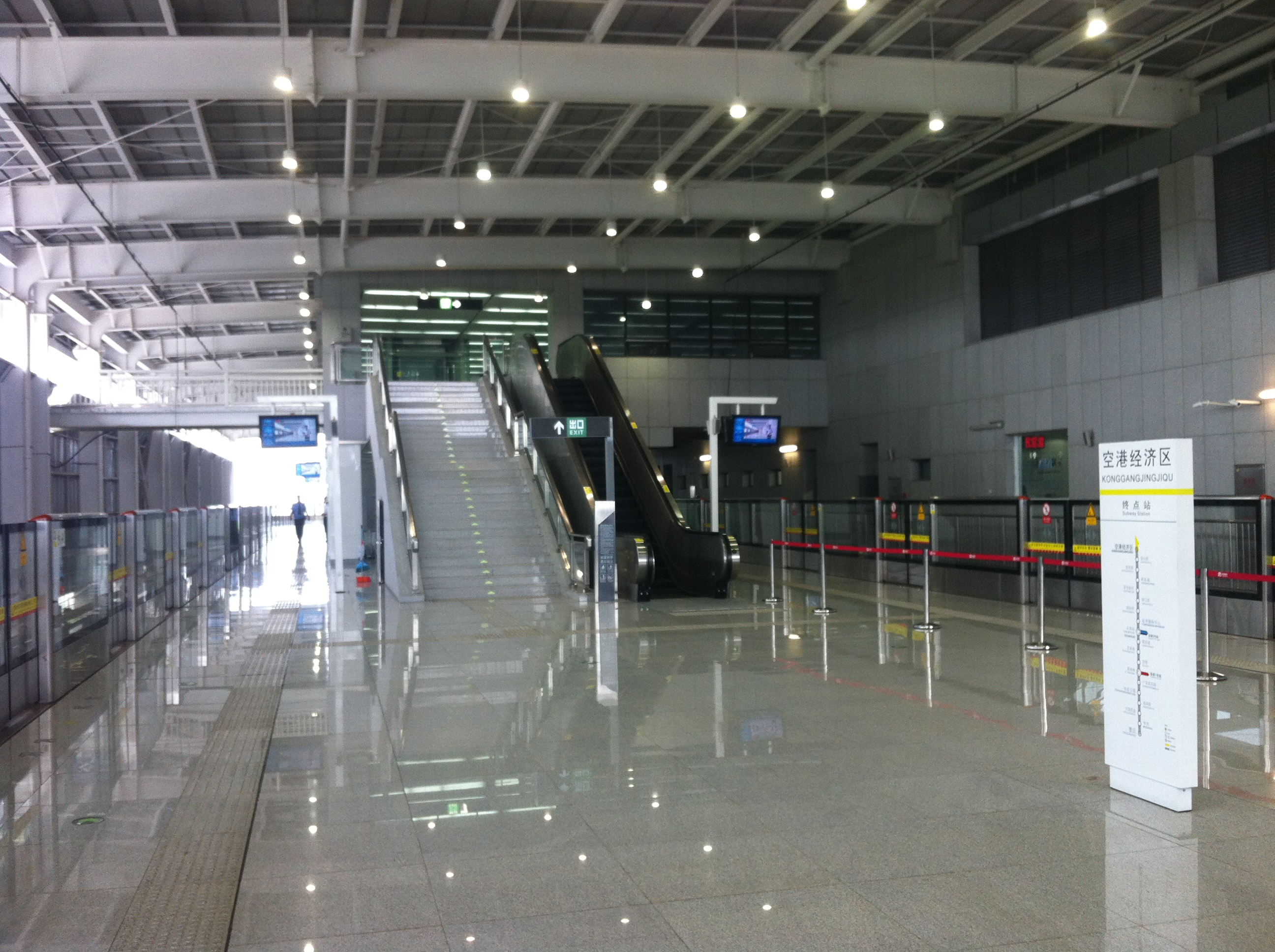 空港经济区站